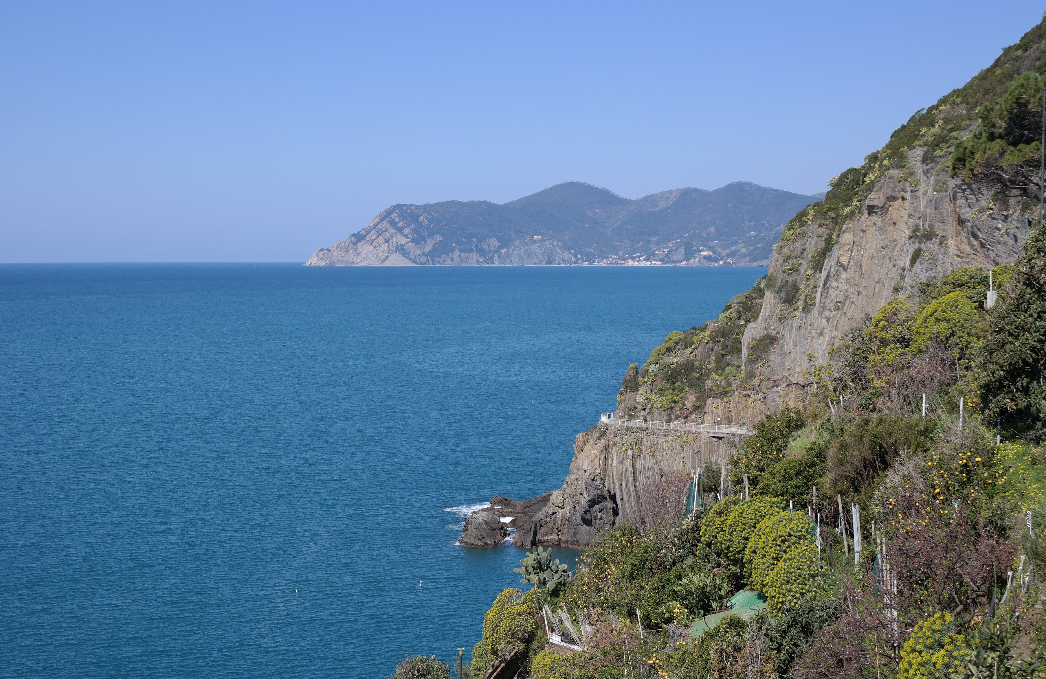 Panorama della costa delle Cinque terre da Riomaggiore